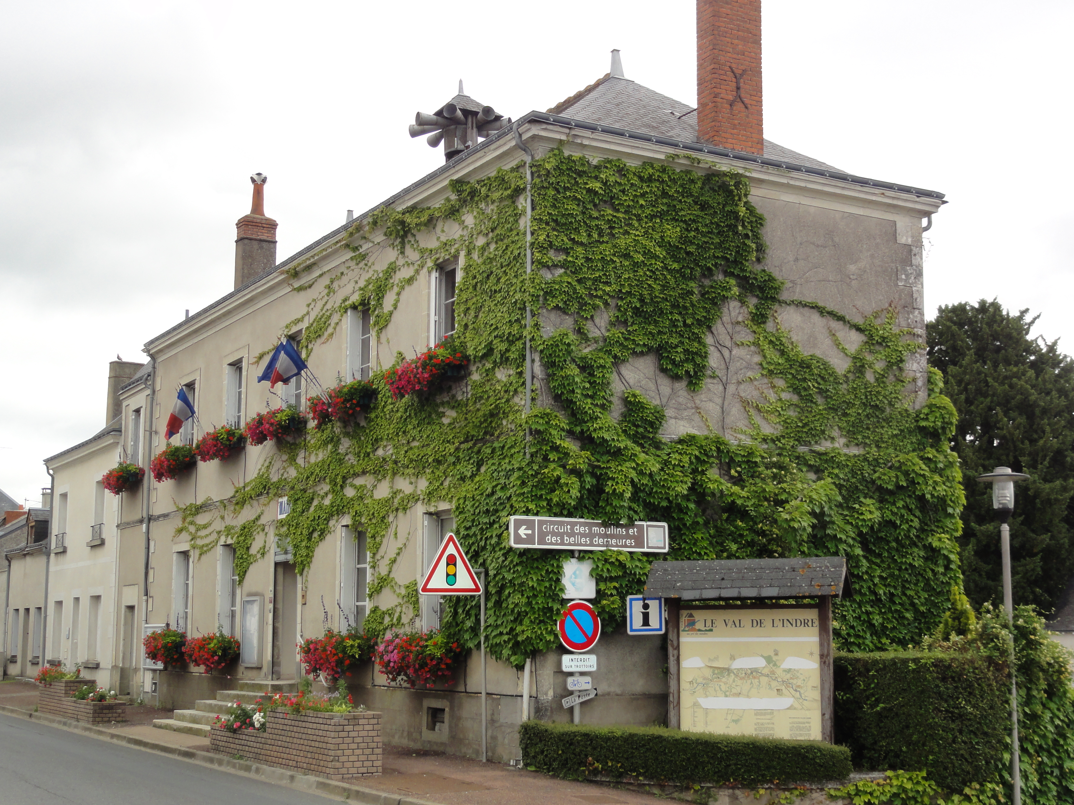 Sorigny (Indre-et-Loire) Mairie